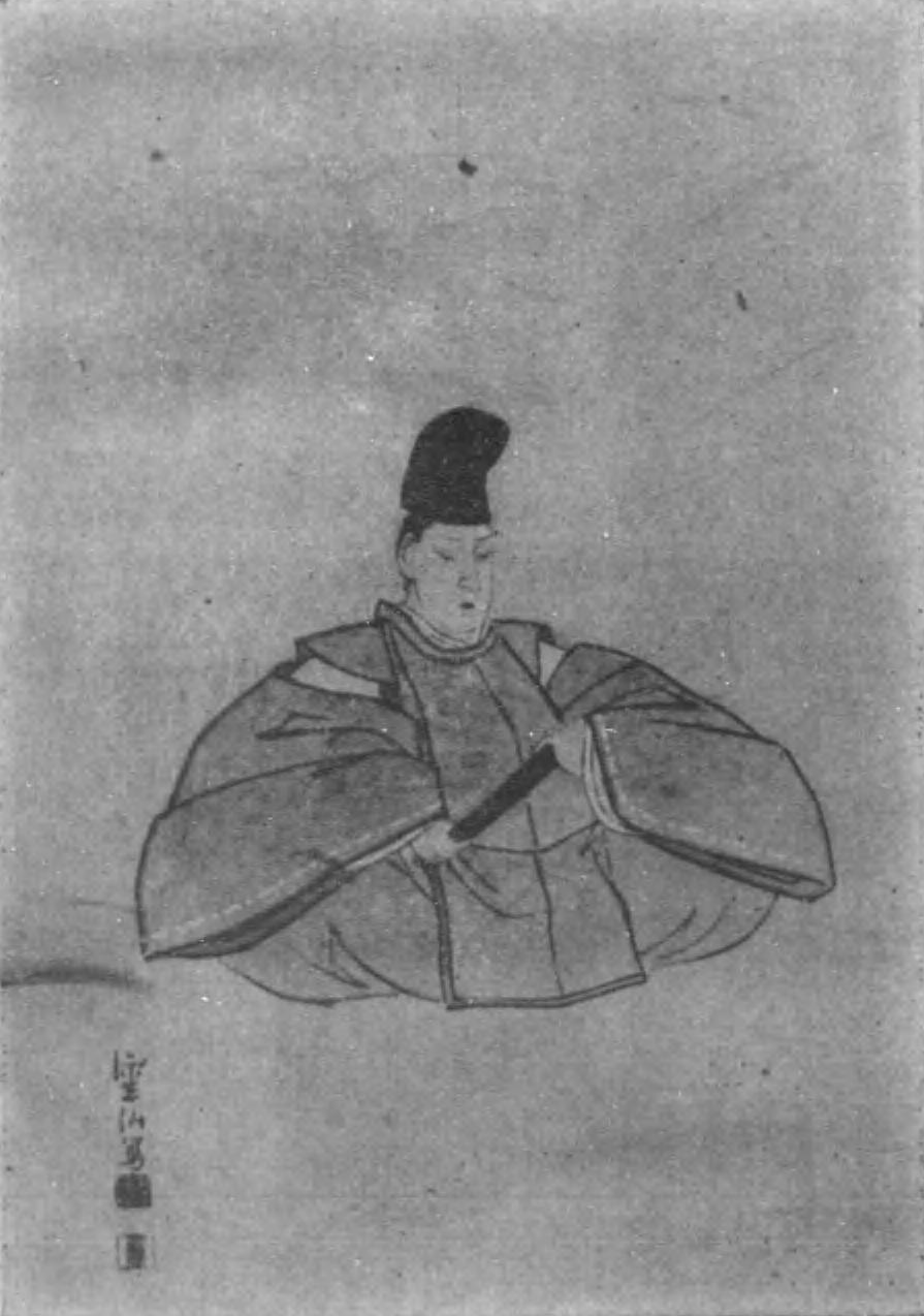 藤井高雅大人画像 三宅正太郎氏所蔵 高雅壮年の頃、三好雲仙（明治十余年没）をして描かしめたもの